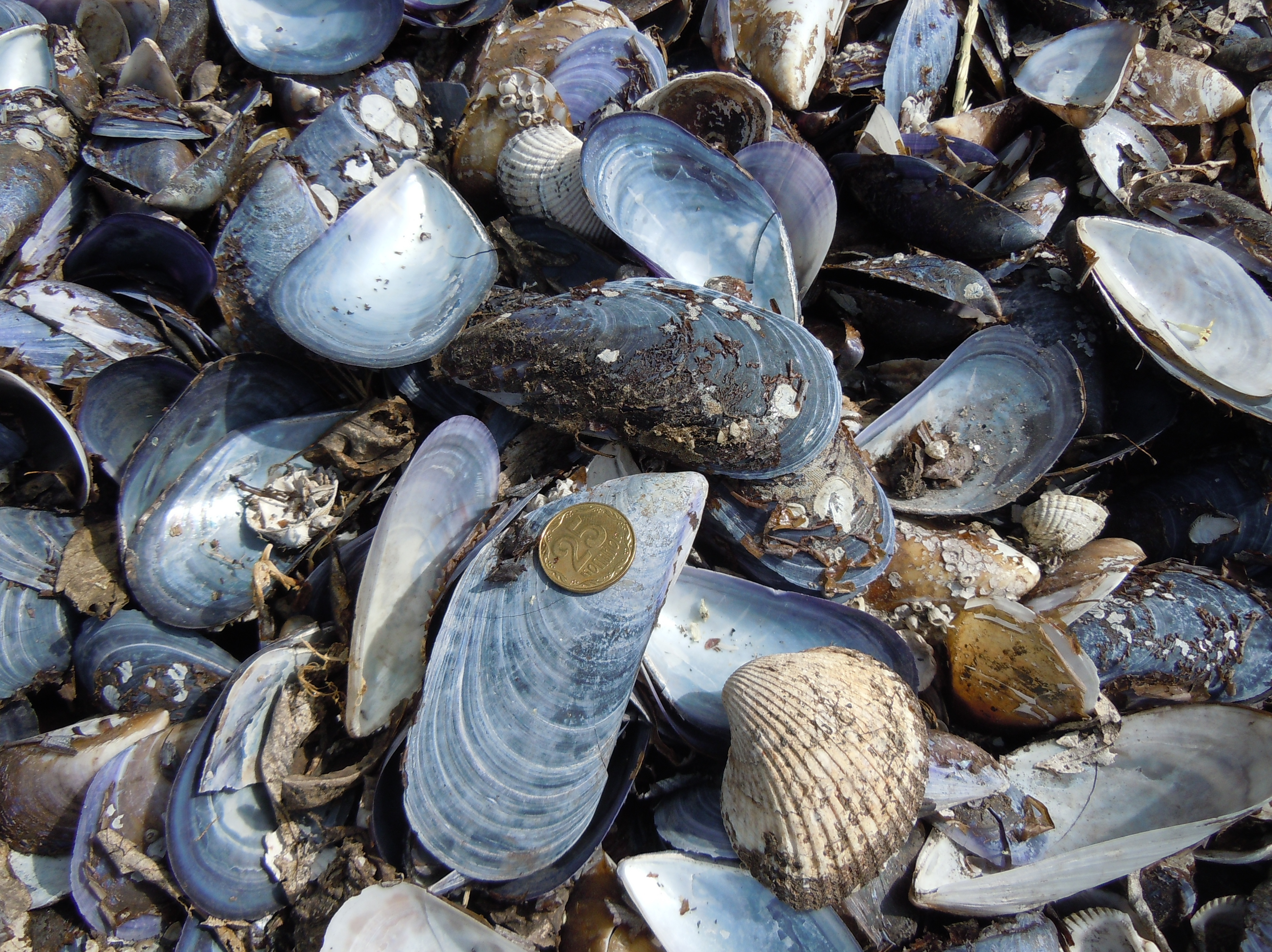 Мушлі Mytilus galloprovincialis і Anadara kagoshimensis на березі Григорівського лиману